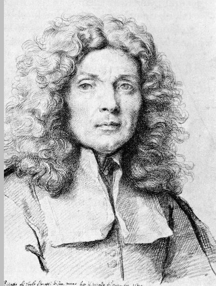 Darstellung mit Blick nach vorne und leicht nach rechts gedrehtem Haupt, mit lockigem halblangem Haar.